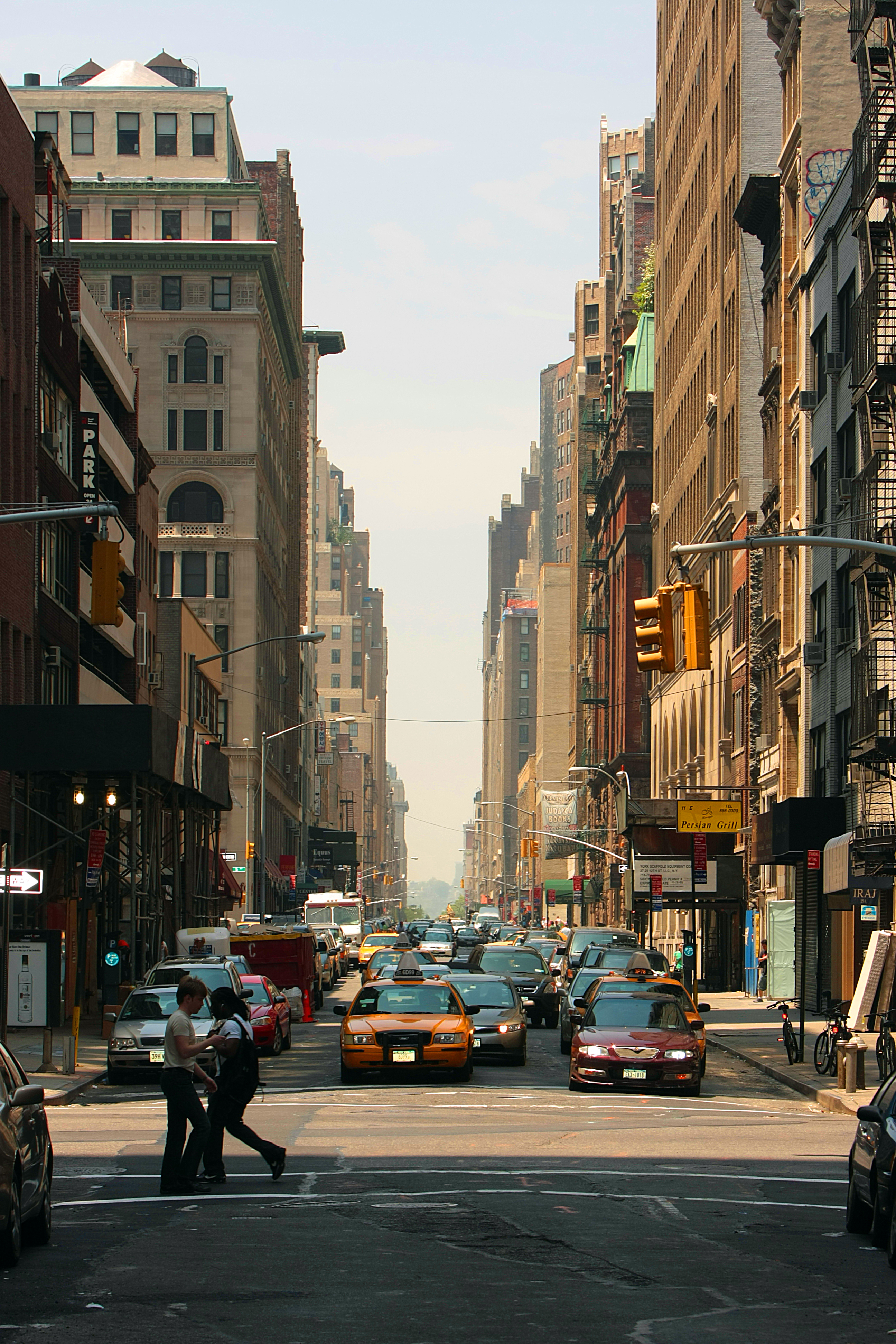 New York